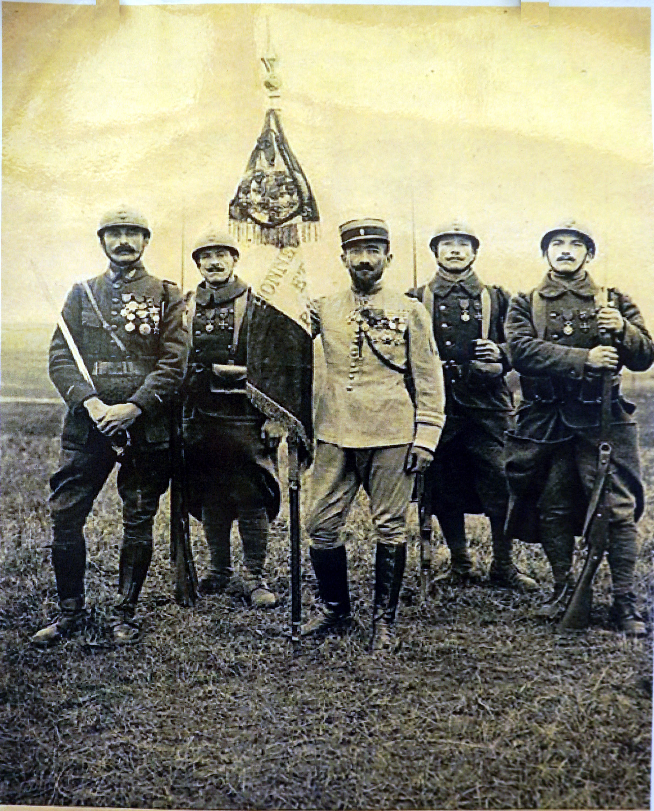 lors de la bataille des monts de chamapgne.